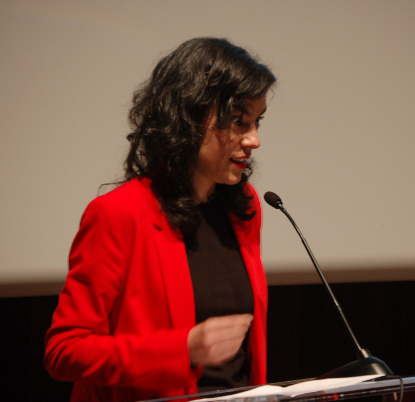 Rosalía Fernández Rial na entrega do Premio Illa Nova 2018